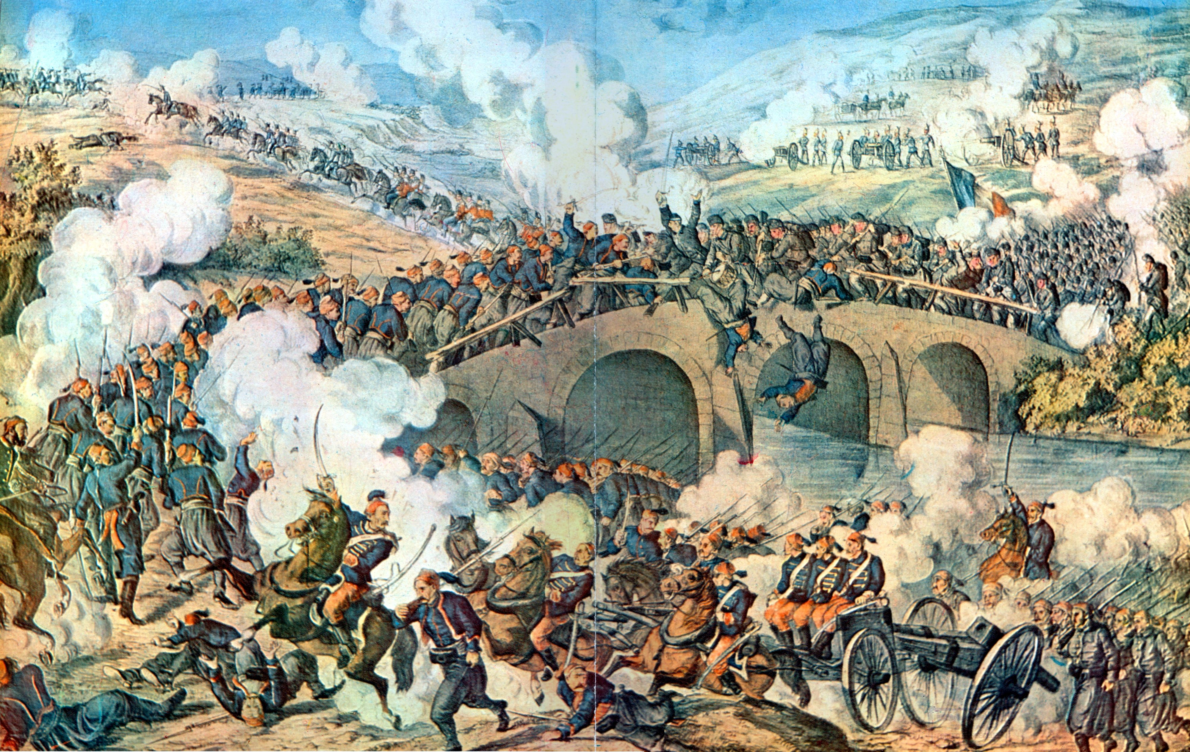 Battle at bridge Skit, November 9, 1877.